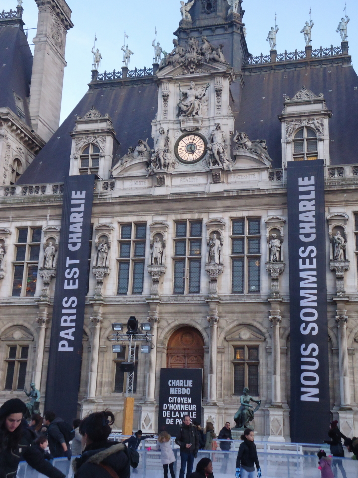 Hotel de Ville, Paris est Charlie, Nous sommes Charlie